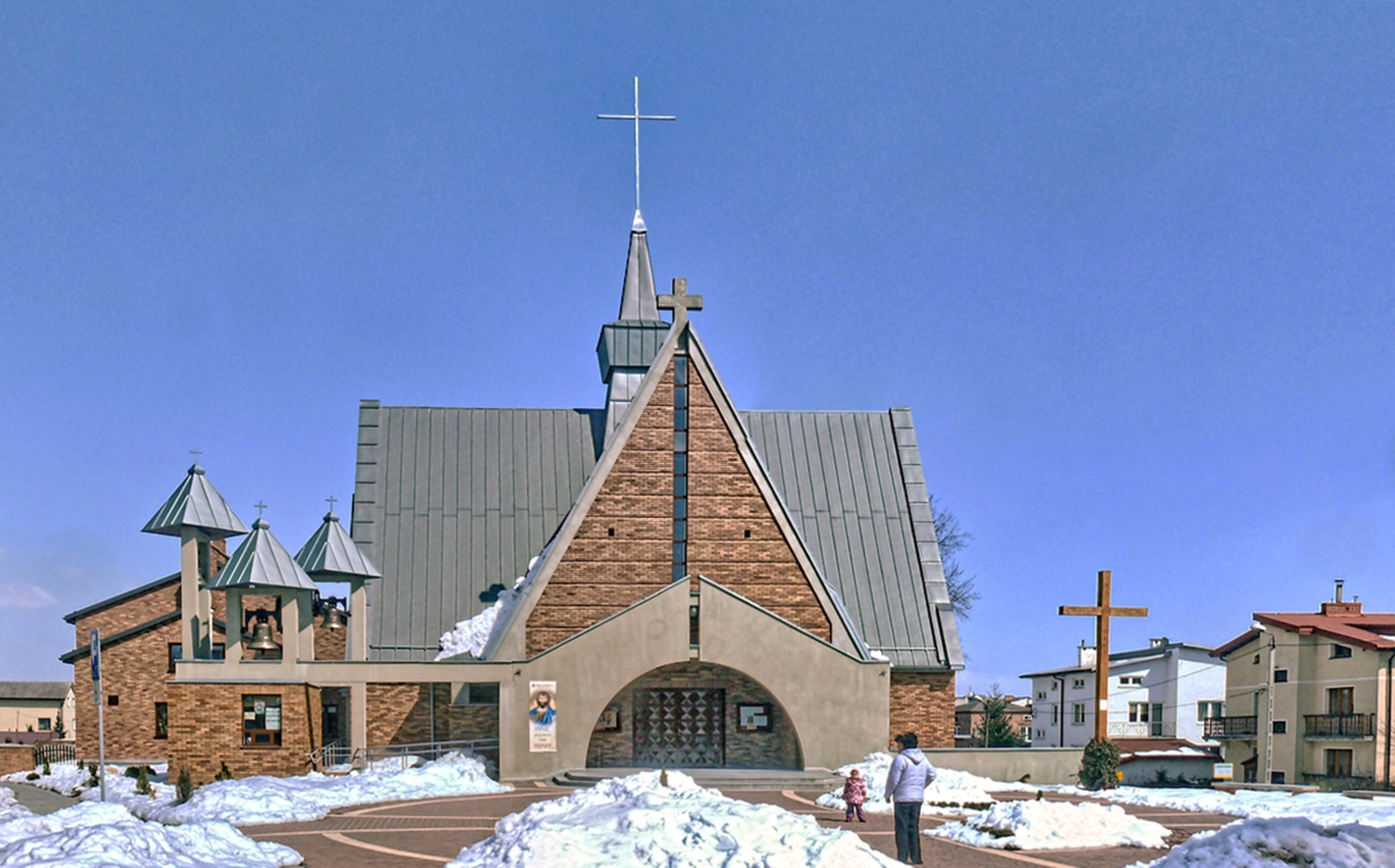 Kościół p.w. Chrystusa Króla w Lublinie.